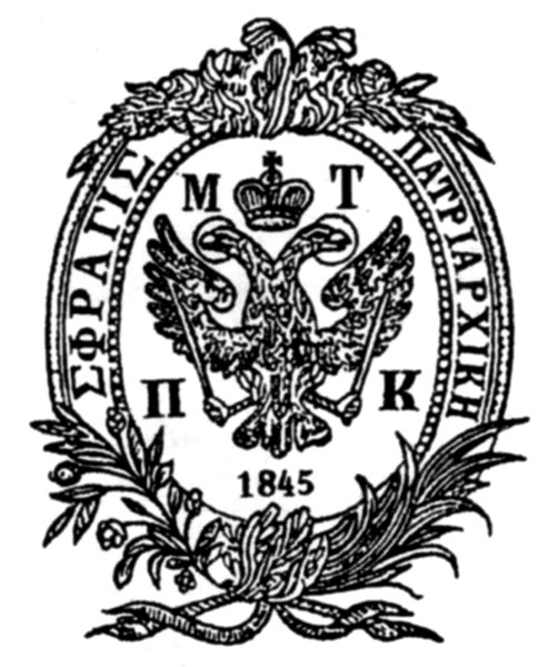 Αποτύπωμα σφραγίδας του Μελέτιου Γ΄, πατριάρχη Κωνσταντινουπόλεως